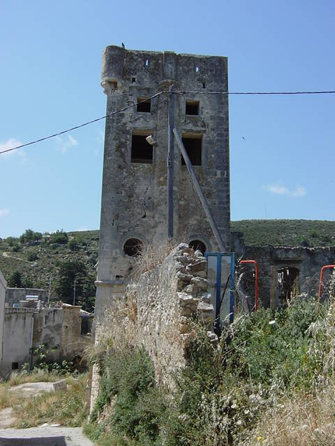 Public Domain selbst fotografiert von Martin Keller im April 2004